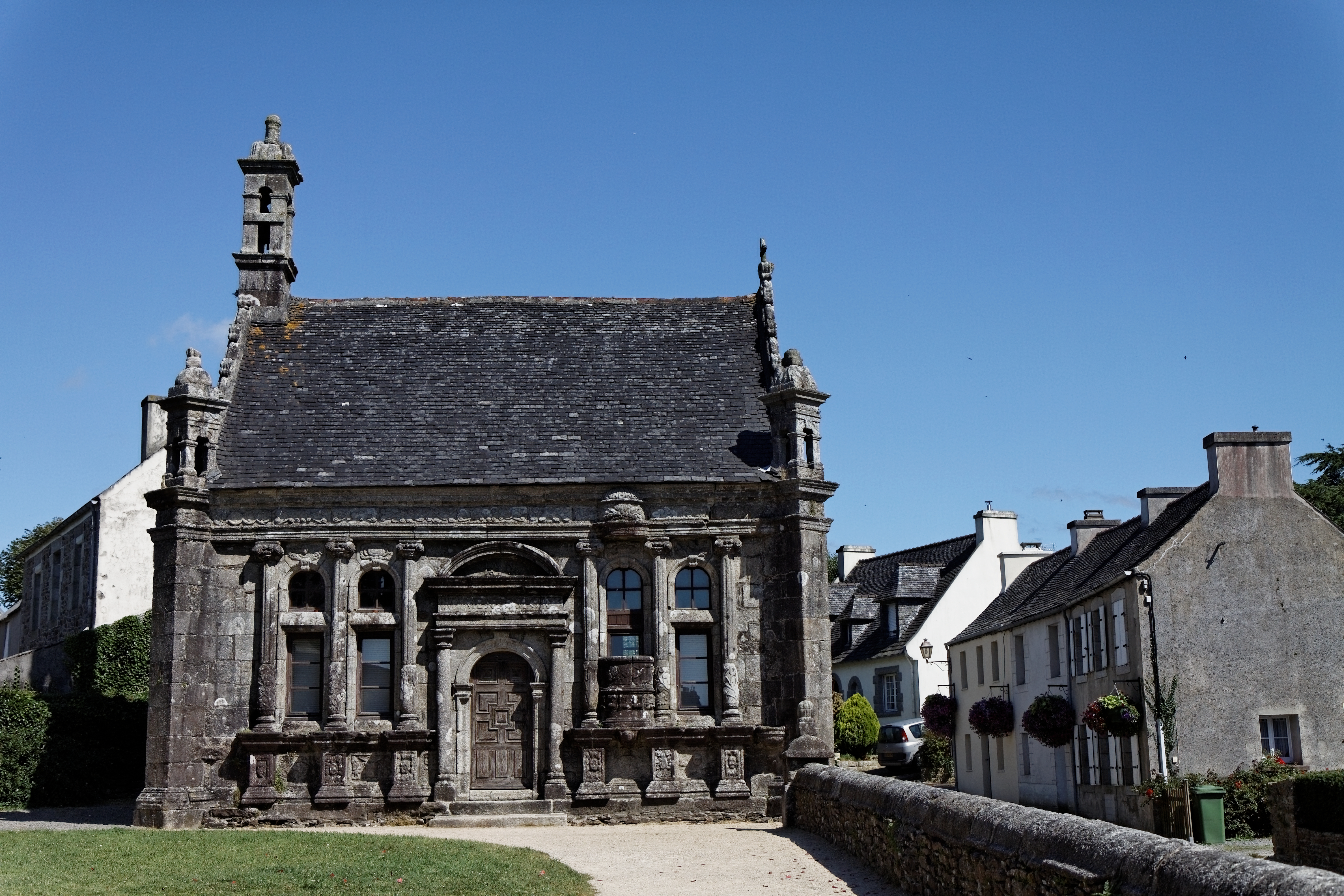 Vue de l'enclos paroissial de Guimiliau.